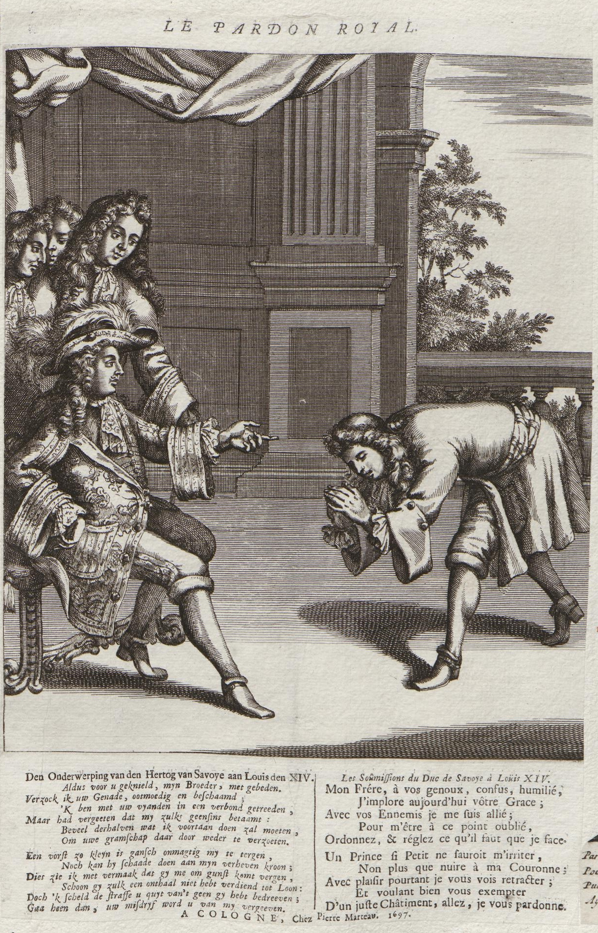 Grafik aus dem Klebeband Nr. 18 der Fürstlich Waldeckschen Hofbibliothek Arolsen Motiv: Victor Amadeus Herzog von Savoyen unterwirft sich König Ludwig XIV. (Vertrag von Turin 1696??) "Le Pardon Royal"; "Den Onderwerping van den Hertog van Savoye aan Louis den XIV." Cologne, chez "Pierre Marteau", 1697